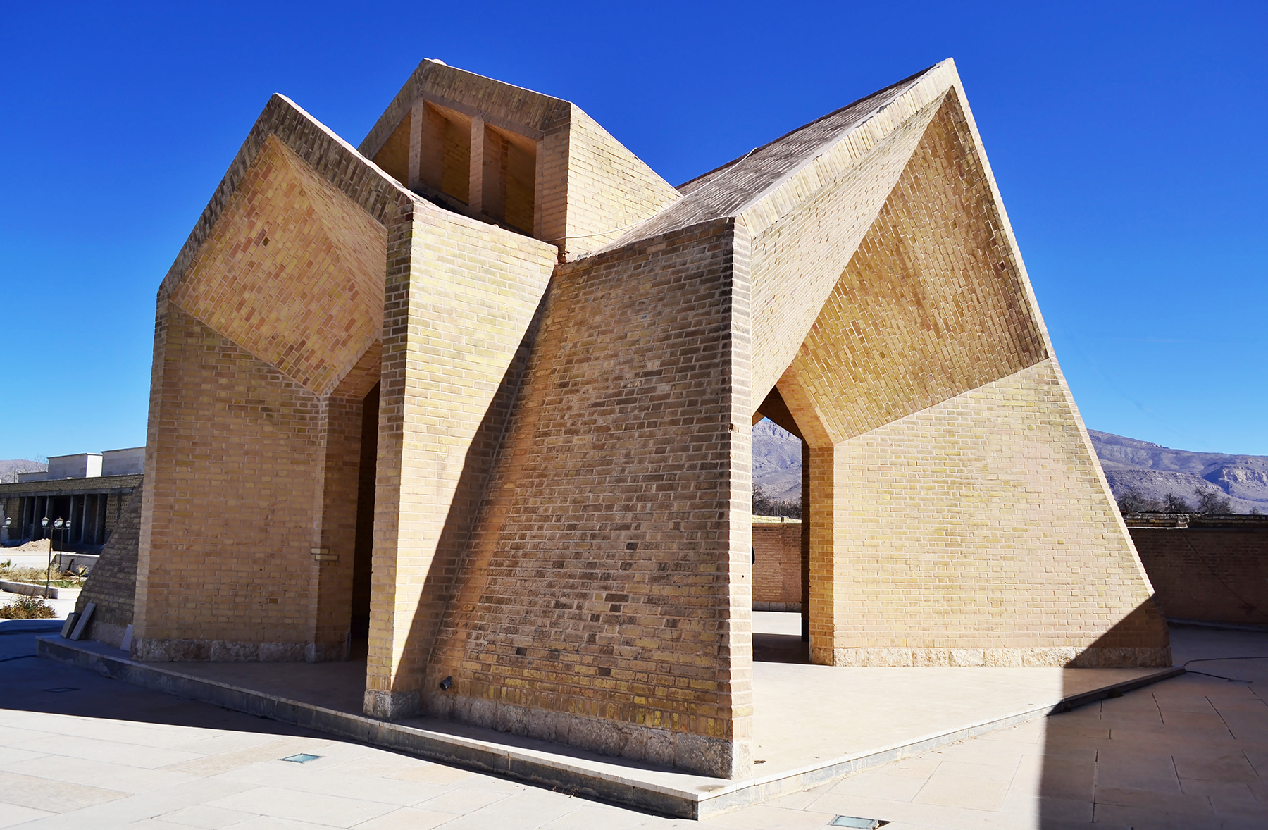 Ahmad Neiriz memorial